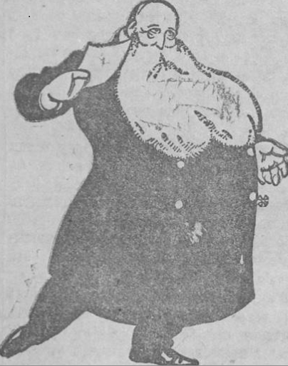 Карикатура на Василя Григоровича Колокольцова опублікована у харківській газеті Утро №1825 від 14.12.1912 с.6